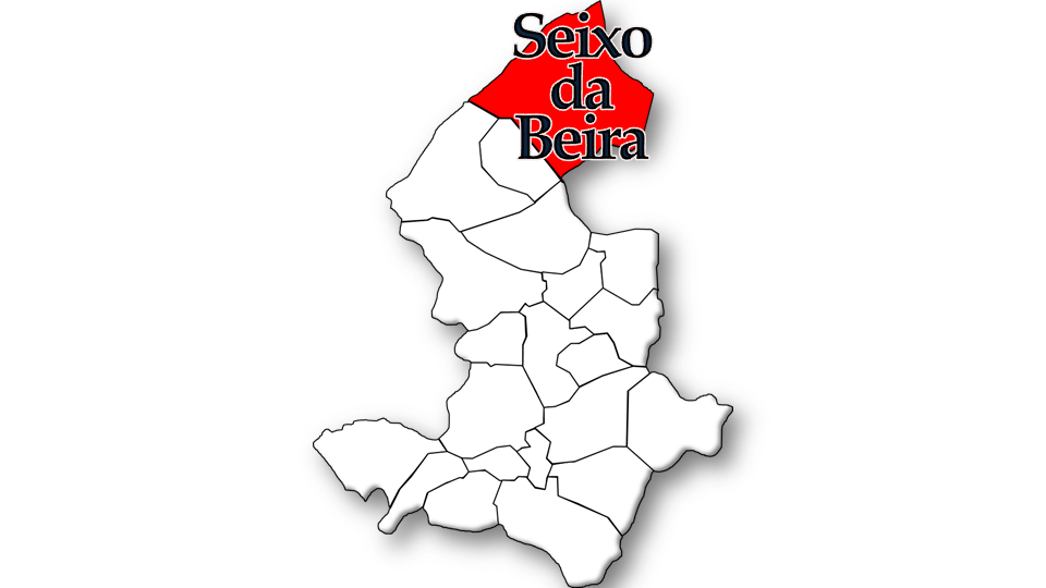 População